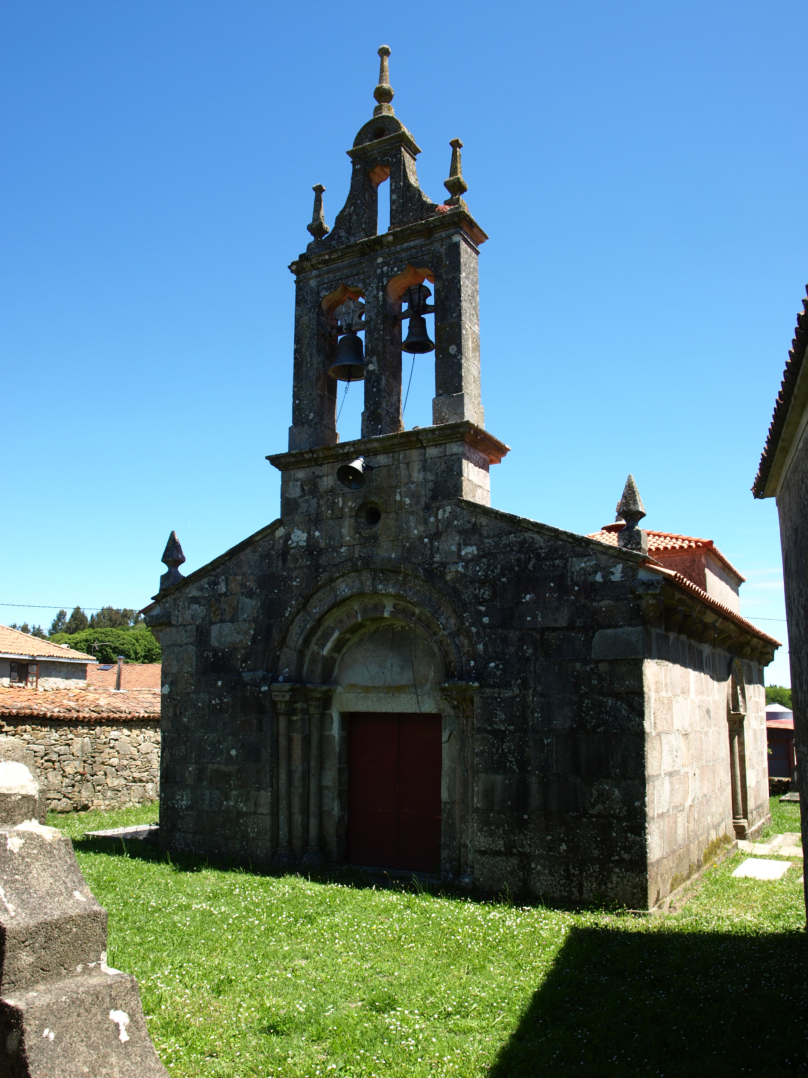 Igrexa parroquial de Albá (Palas de Rei)